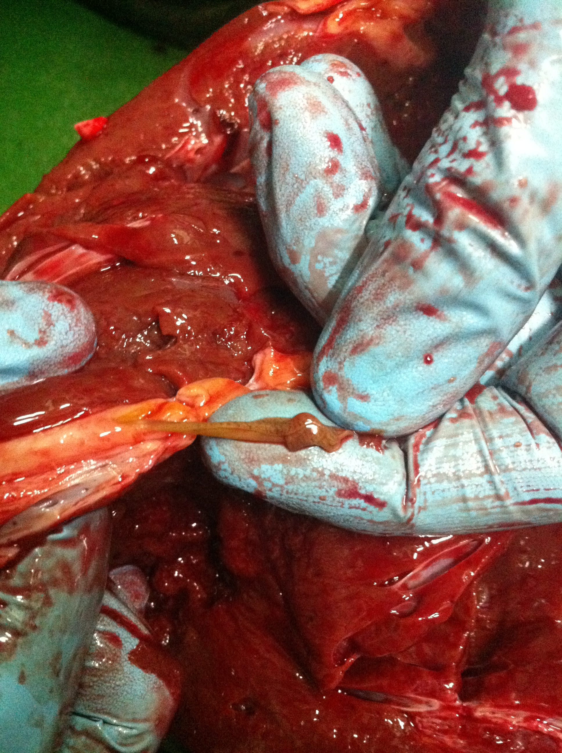 Falsciola hepática en Conducto Biliar. Higado de Vacuno